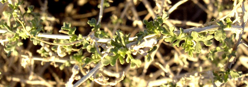 Fallugia paradoxa foliage